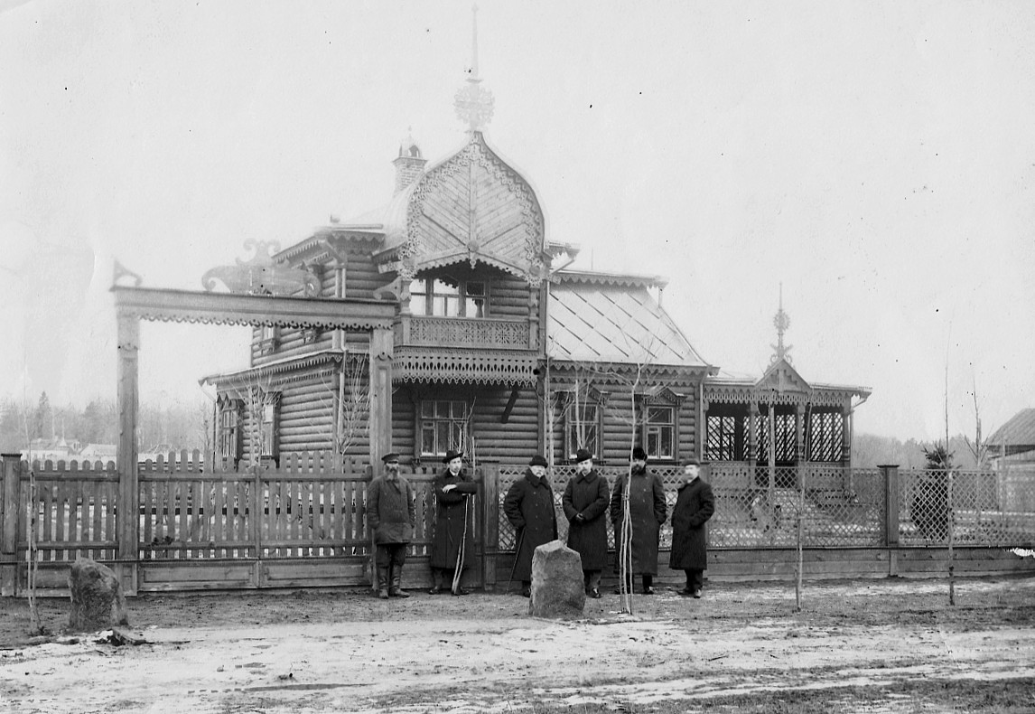 Fritz Meyers villa i Nikolskoje vid Moskva. Personerna från vänster: okänd, sonen Dima/Dimitrij, Fritz Meyer själv, sonen Anatolij, okänd, okänd.